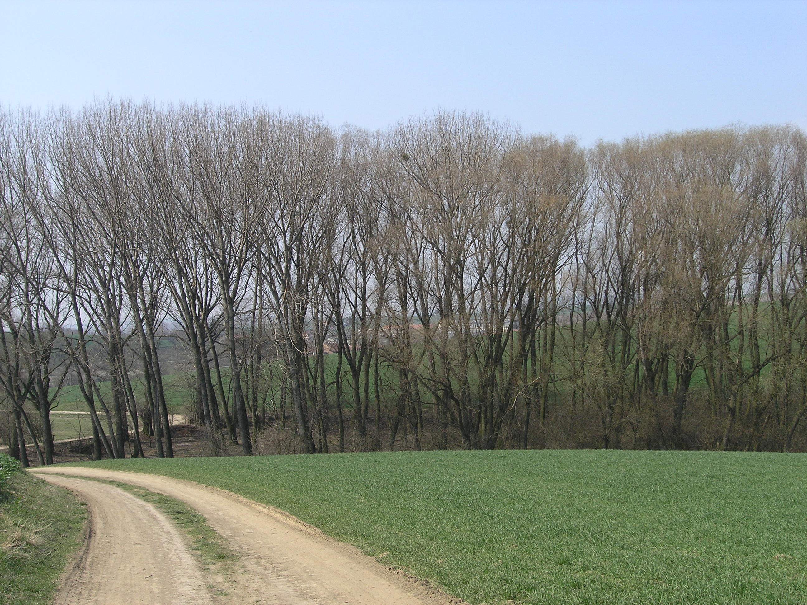 Šardičky východní strana; bývalý "horní" rybník GPS:49°10'33.55"N; 17°2'27.3"E